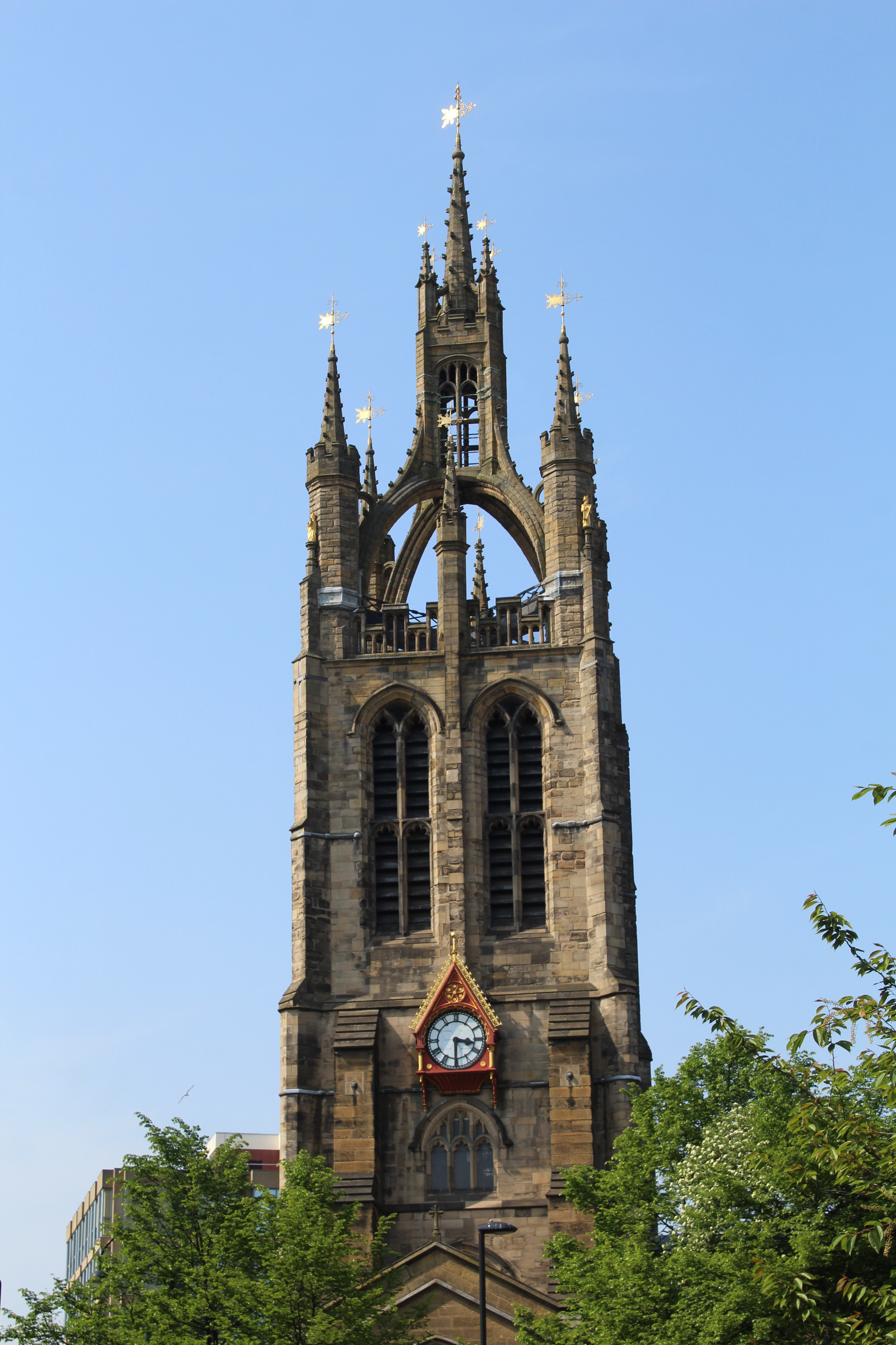 Cathédrale Saint-Nicolas, Newcastle upon Tyne.